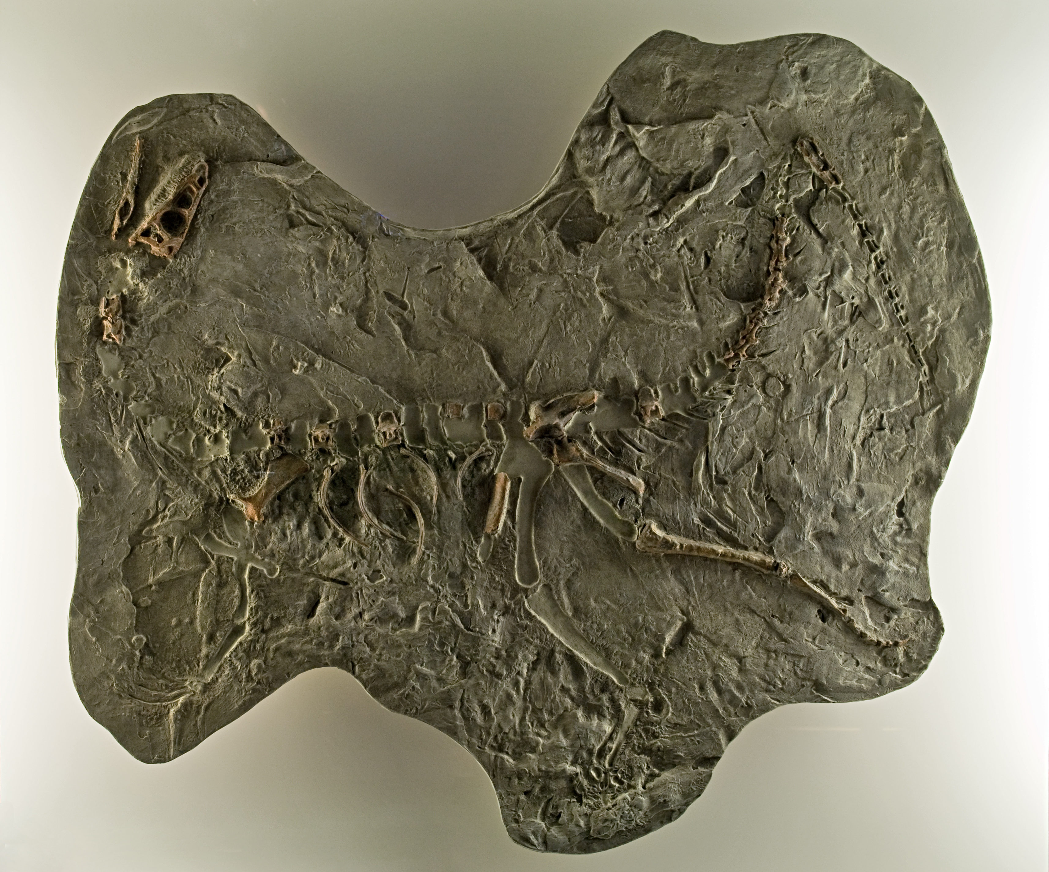 Fossil Panphagia